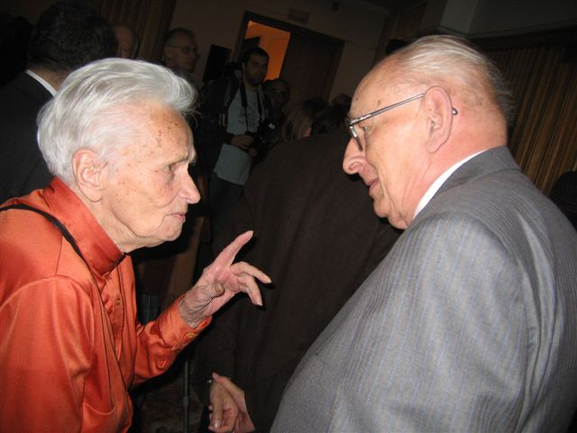 W:pl: Barbara Skarga (1919-2009), and Władysław Bartoszewski (1922-2015), Polish historian, and politician